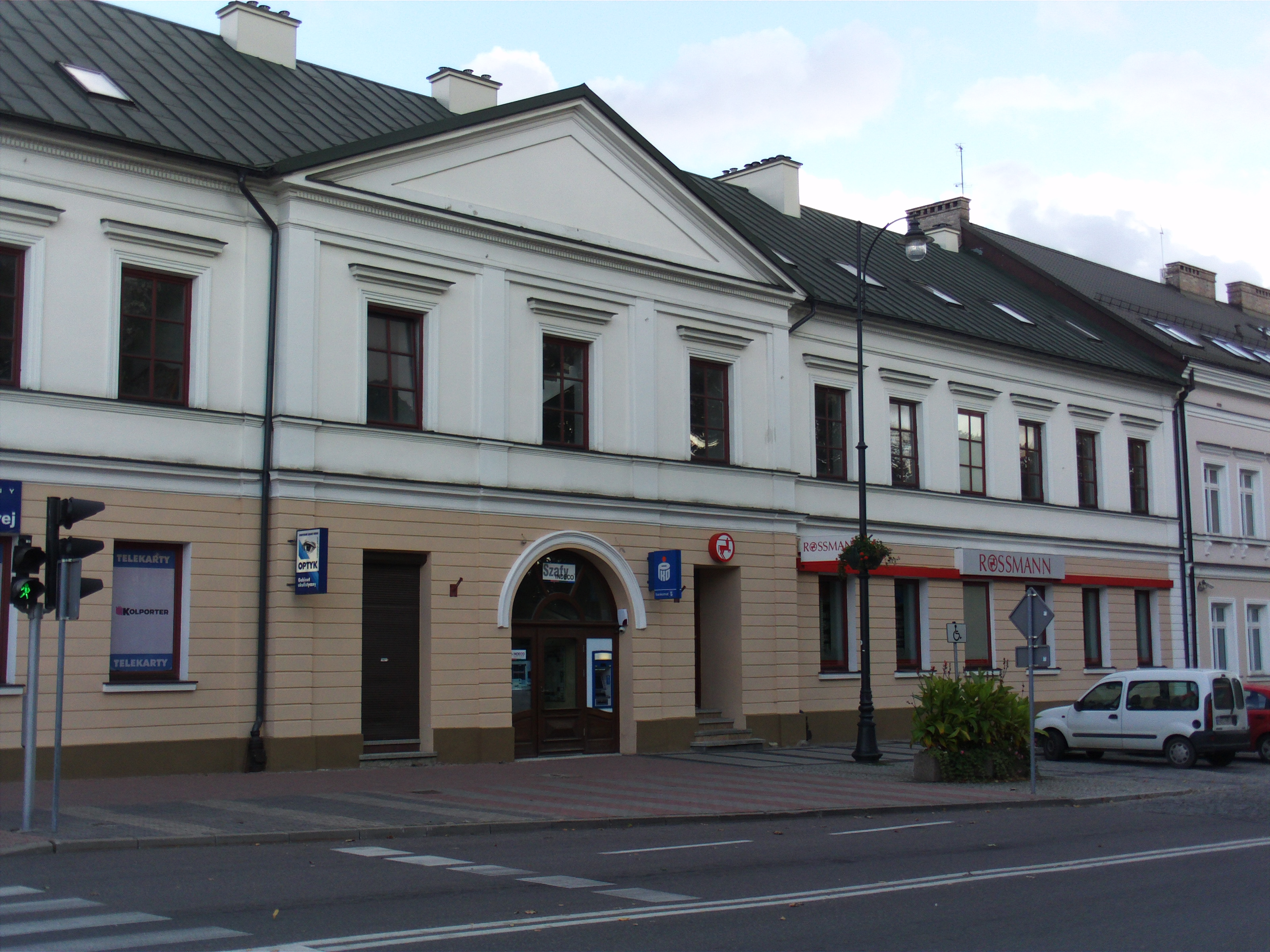 Suwałki ul. Kościuszki 74